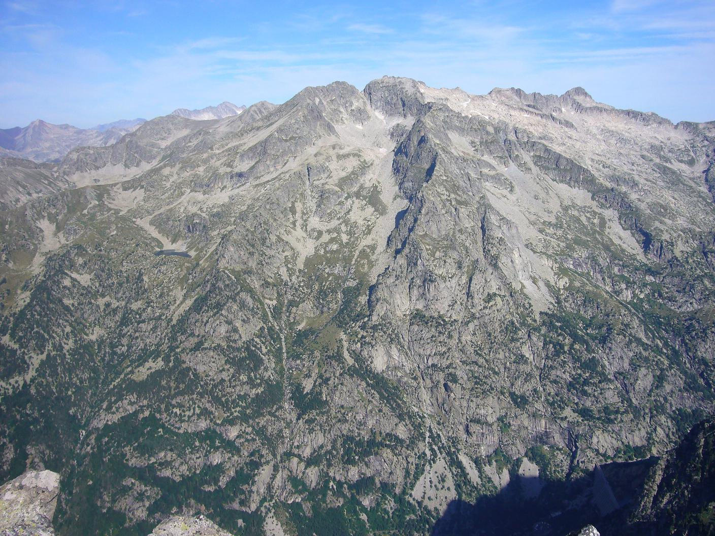 Massís de Besiberri vist des dels Pics de Comaltes; la Vall de Boí, Alta Ribagorça, Catalunya